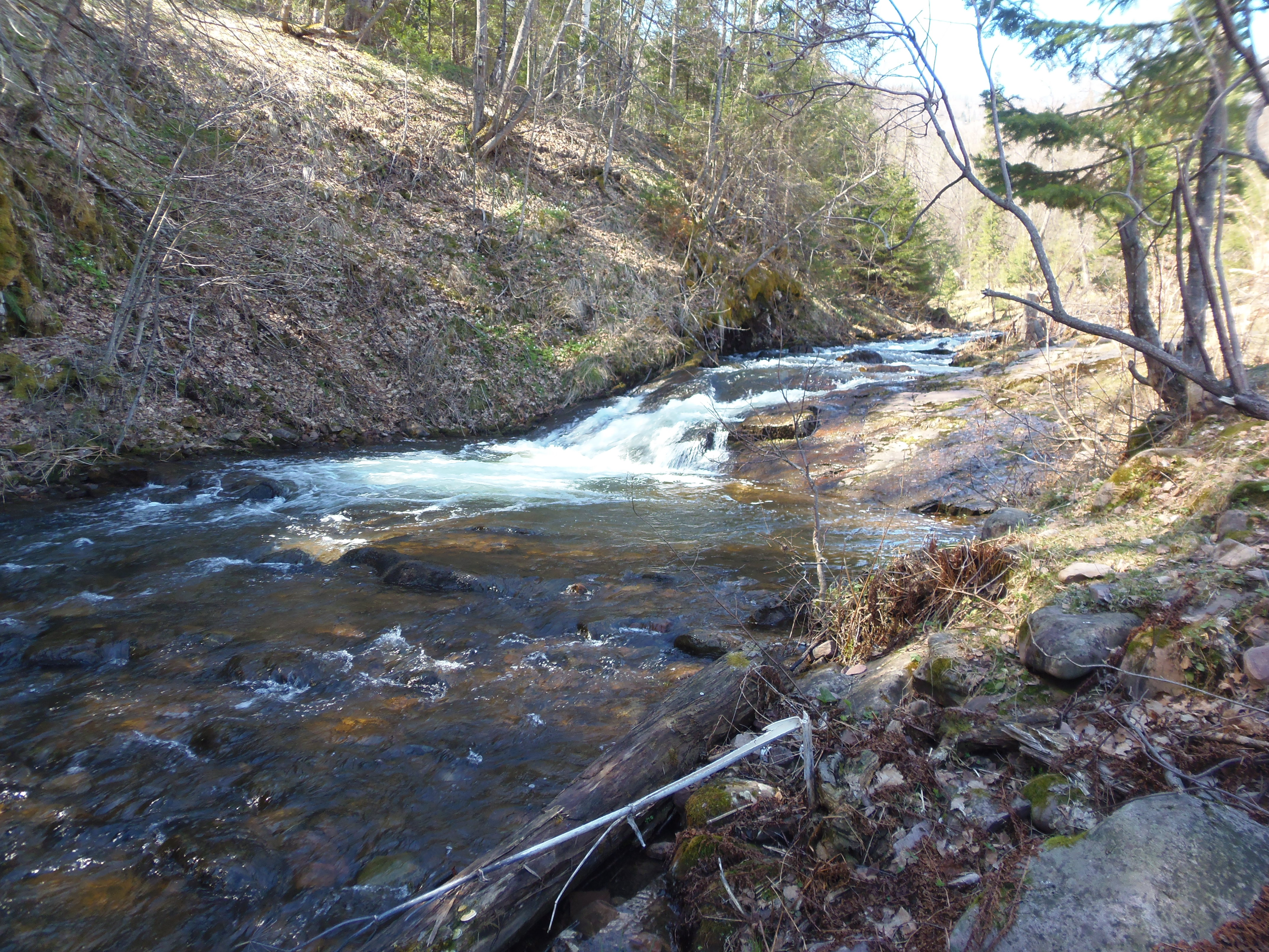 Һилеғорғо (Селигурга).Зуяк Белорецкий район. Башкортостан.